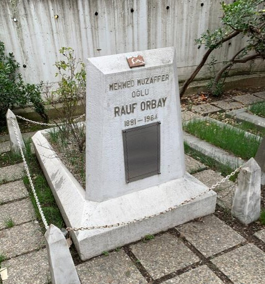 Rauf Orbay'ın İstanbul, Erenköy, Sahrayıcedid Mezarlığı'ndaki Kabri